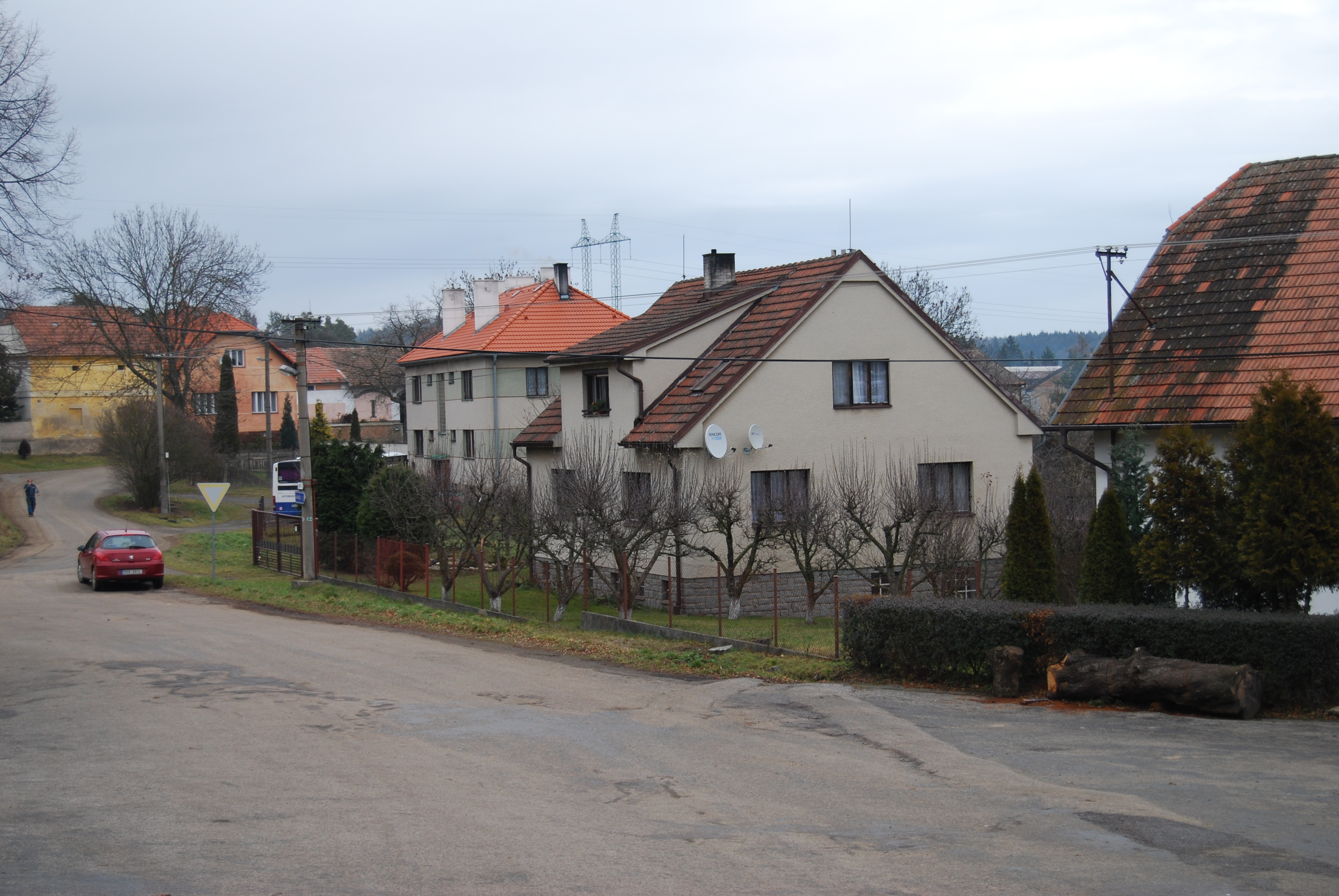 Pohled na část obce. Cetyně v okrese Příbram, kraj Středočeský. Česká republika. - OpenStreetMap (Info)